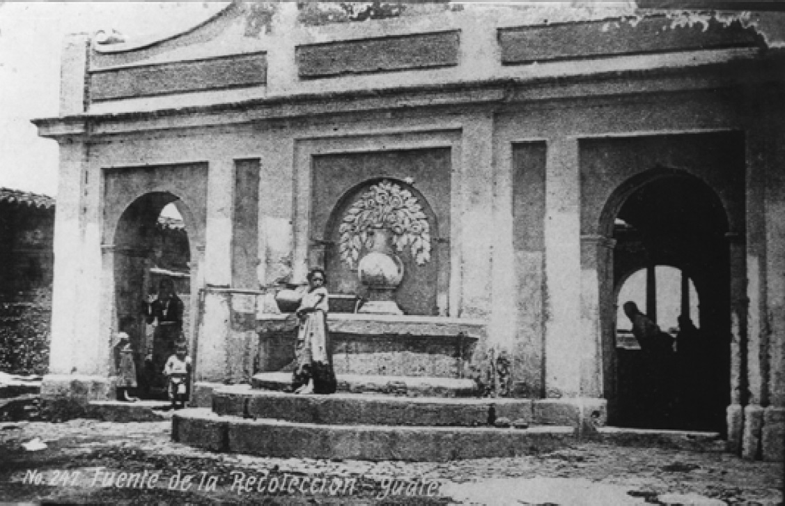 Fuente de la Iglesia de la Recolección, Ciudad de Guatemala.